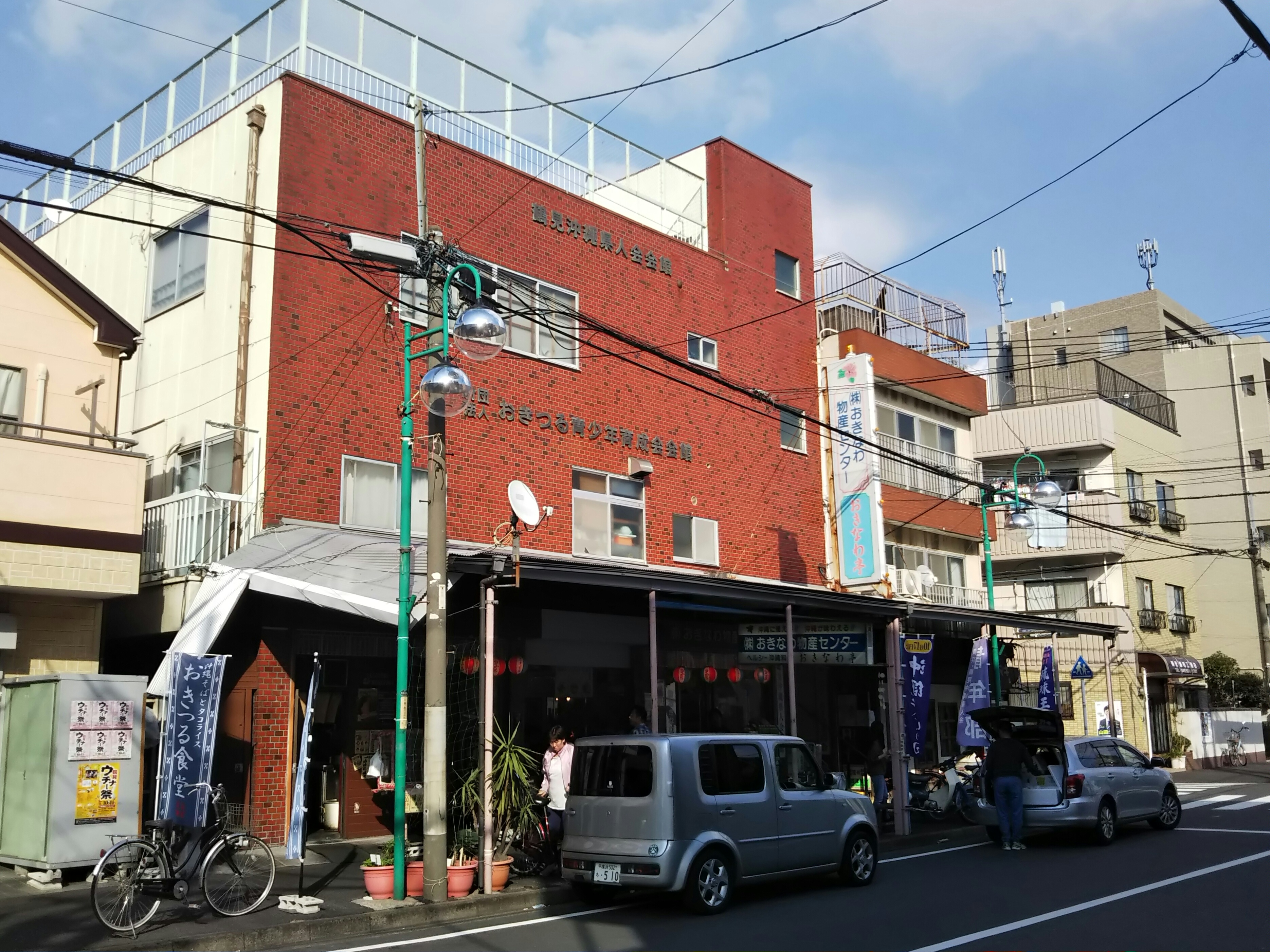 横浜市鶴見区仲通、鶴見沖縄県人会会館